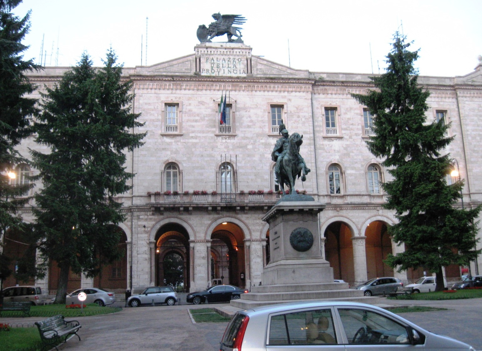 Monument to Victor Emmanuel II (Perugia)